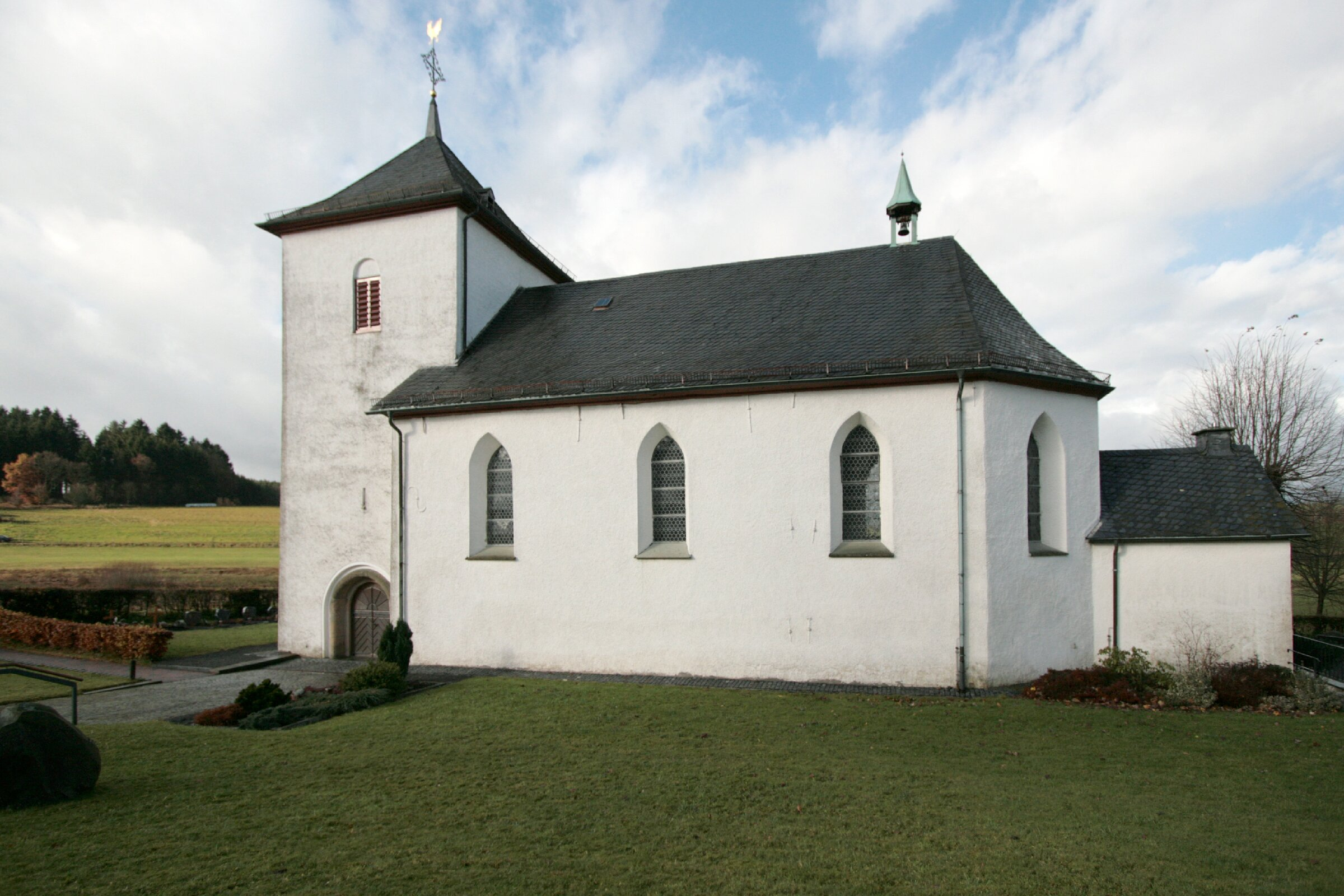 Kirche in Römershagen Gemeinde Wenden